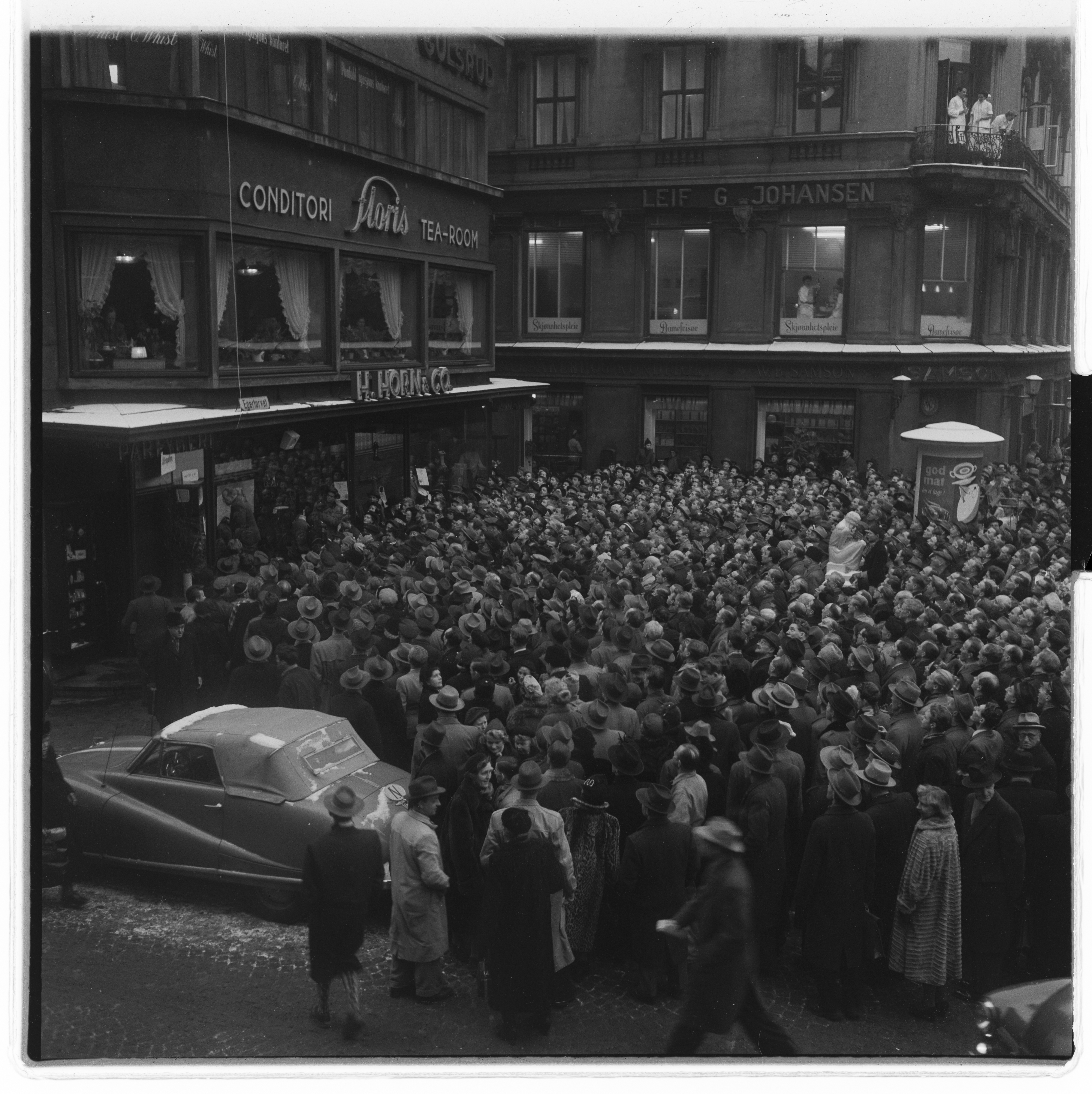 Bildet er hentet fra Arkivverket. Folk har samlet seg for å se de første norske fjernsynsbilder, 12. januar 1954. Arkivinstitusjon : Riksarkivet Arkivnavn : Billedbladet NÅ Sted : Norge, Oslo, Oslo, Egertorget Emneord: TV, Fjernsyn Avbildet